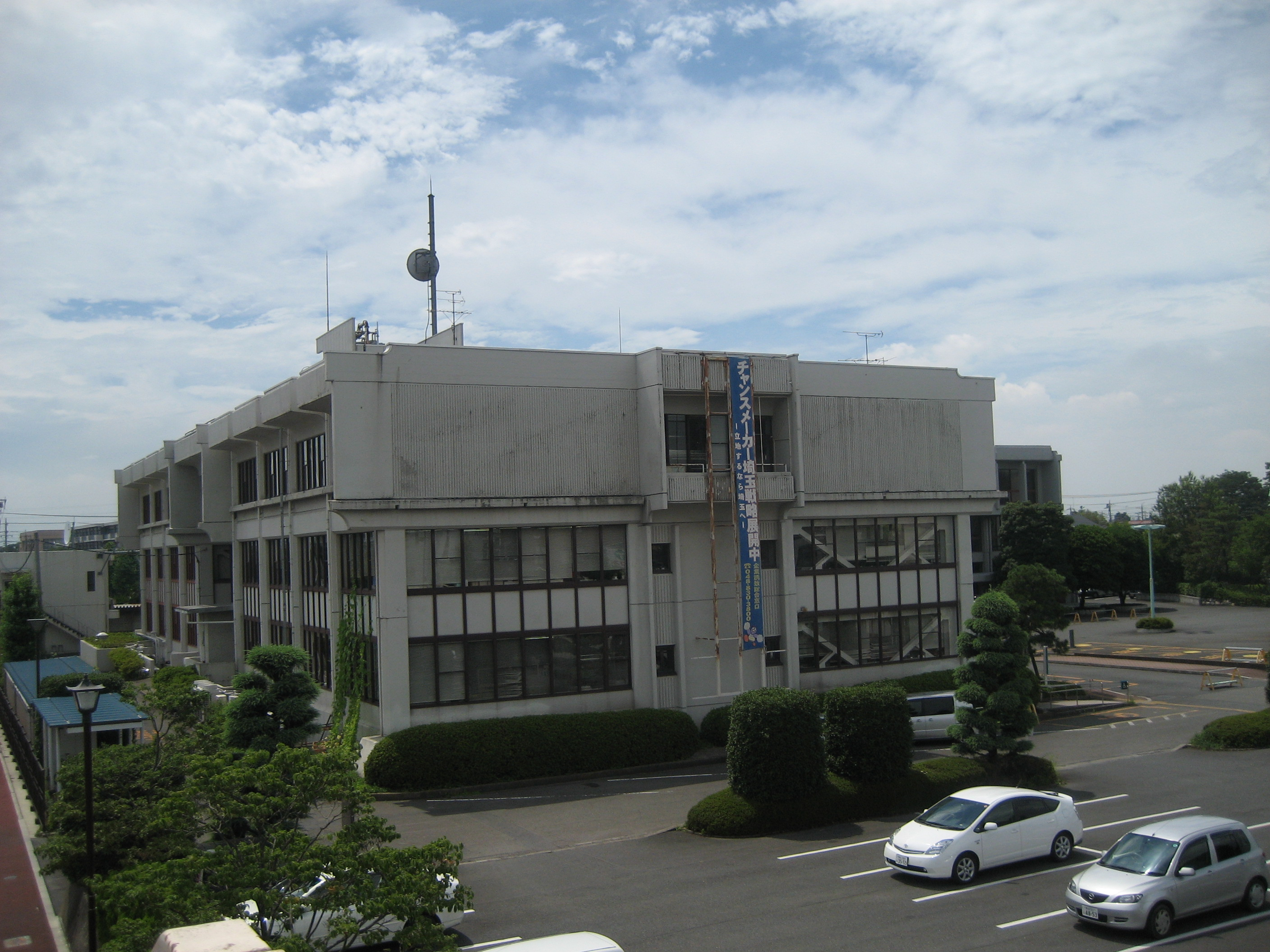 埼玉県行田合同庁舎